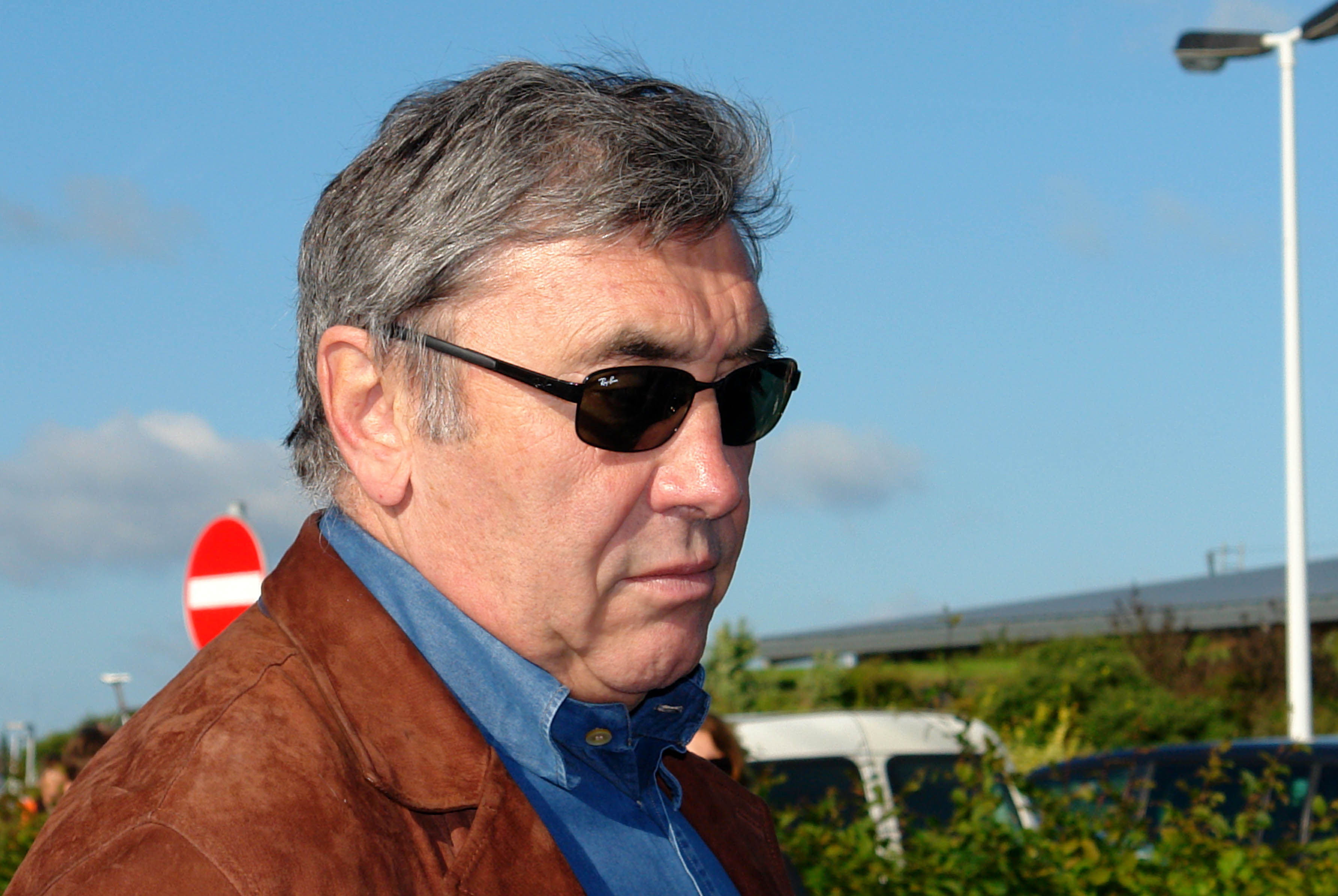 gran fondo 2012